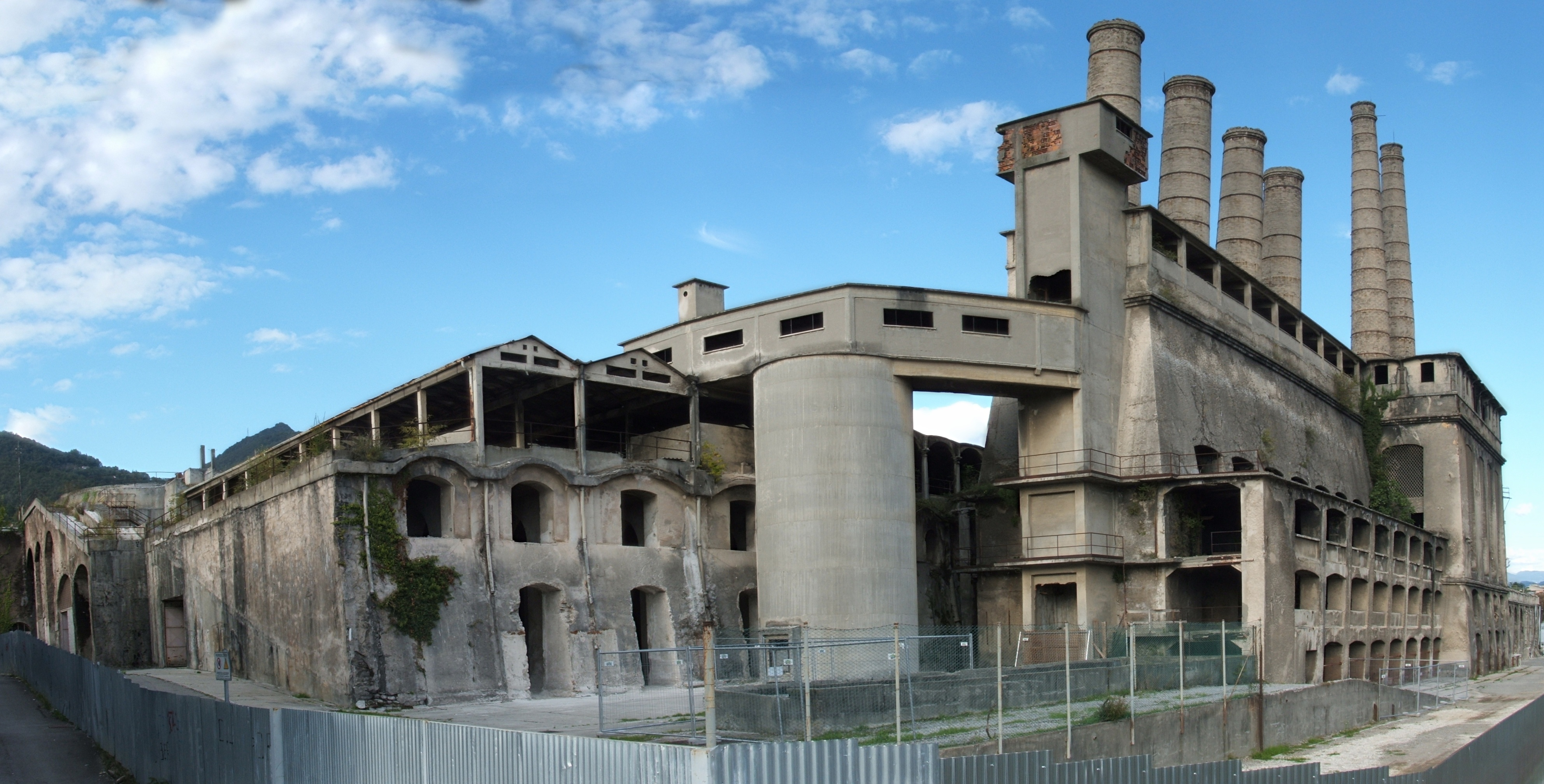 Ex cementificio Italcementi per la produzione del portland naturale